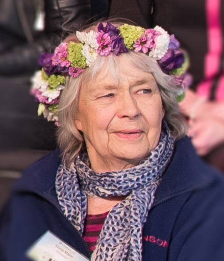 Mona Malm som en av Sommarpratarna i P1 på presskonferensen i Radiohusets trädgård den 3 juni 2015.